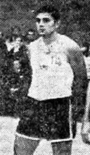 Dragutin "Miško" Čermak (born 12 October 1944 in Belgrade) is a Serbian former basketball player